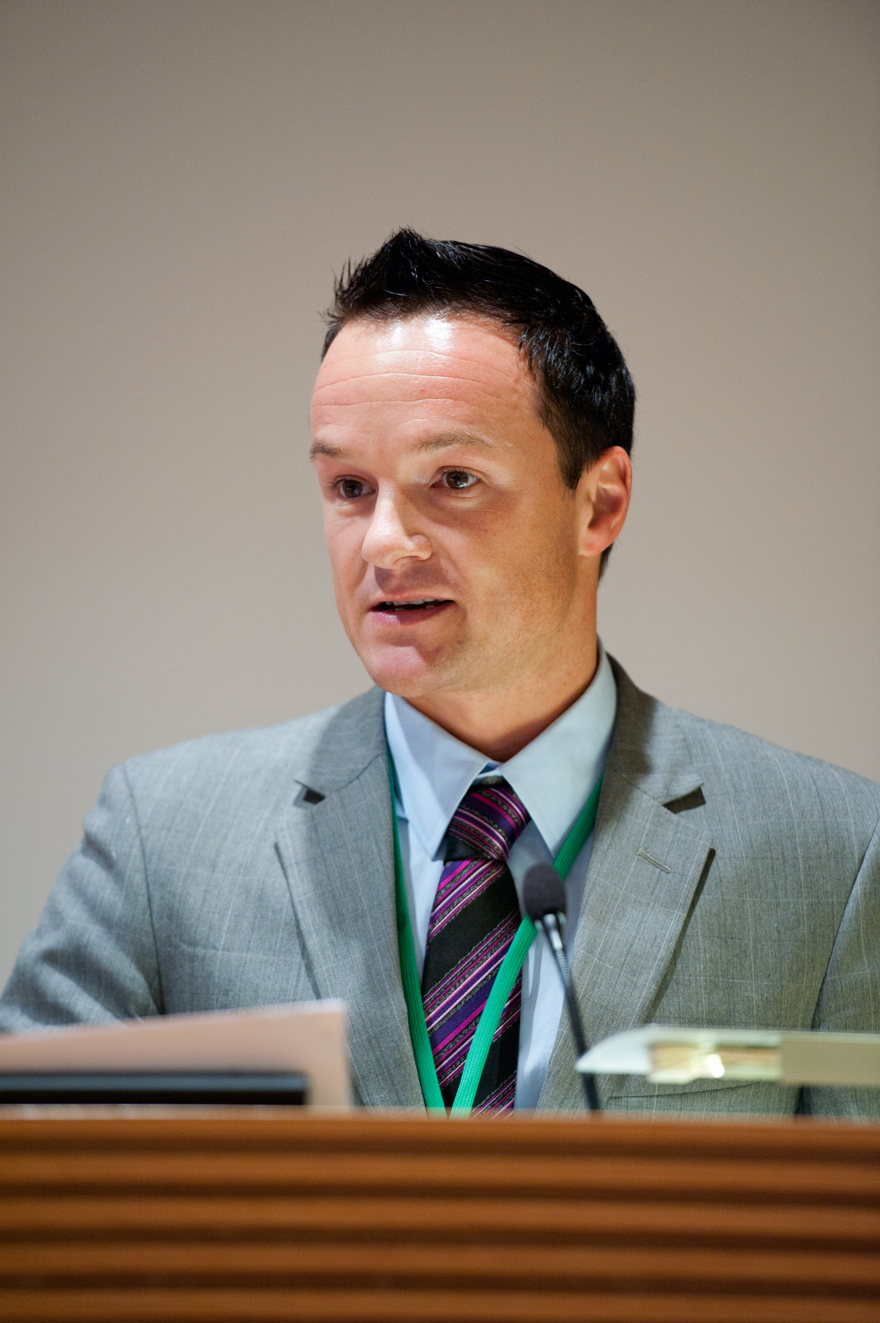 Andre Oktay Dahl, parlamentariker Norge talar vid BSPC 20 i Helsingfors